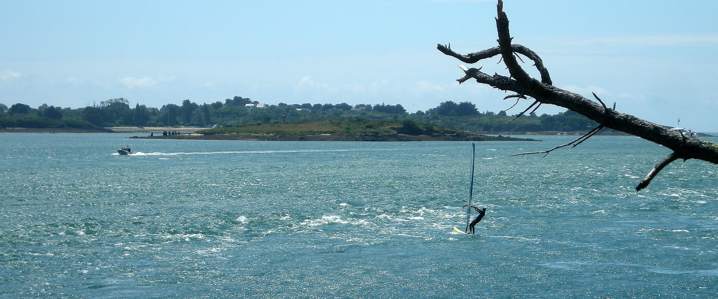 Er Lanic depuis Berder